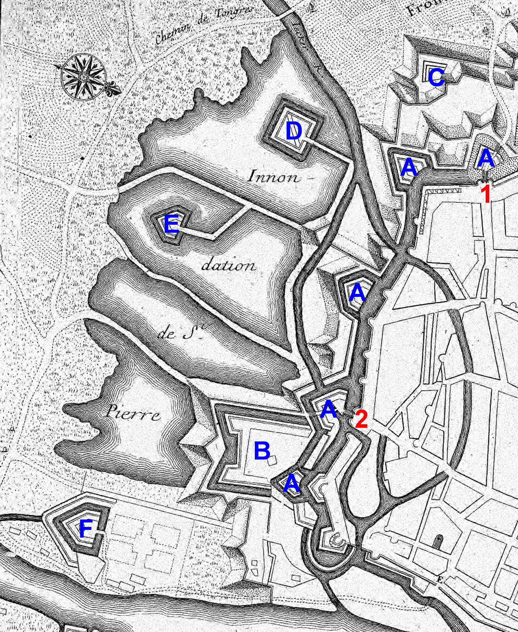 Detail van een Franse kaart van de vestingwerken van Maastricht, in 1708 in Parijs uitgegeven. Hier de inundatiewerken bij het riviertje de Jeker aan de zuidzijde van de stad, meestal De Kommen genoemd (Frans: Innondation de St.-Pierre). Nummers en letters toegevoegd door Kleon3: 1 Tongersepoort; 2 Sint-Pieterspoort; A lunetten; B Hoornwerk Sint-Pieter; C Demi-lune des Mousquetaires; D Jekerschans; E Lunet La Royale; F Bastion Saint-Pierre.